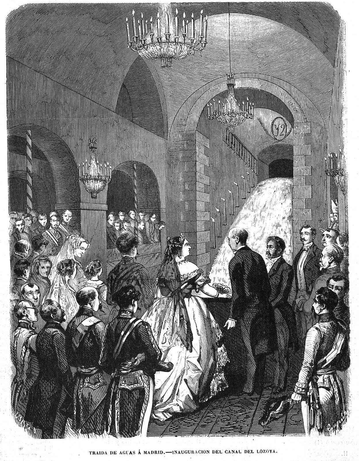 Traída de aguas a Madrid, inauguración del Canal del Lozoya, en la revista española El Museo Universal.